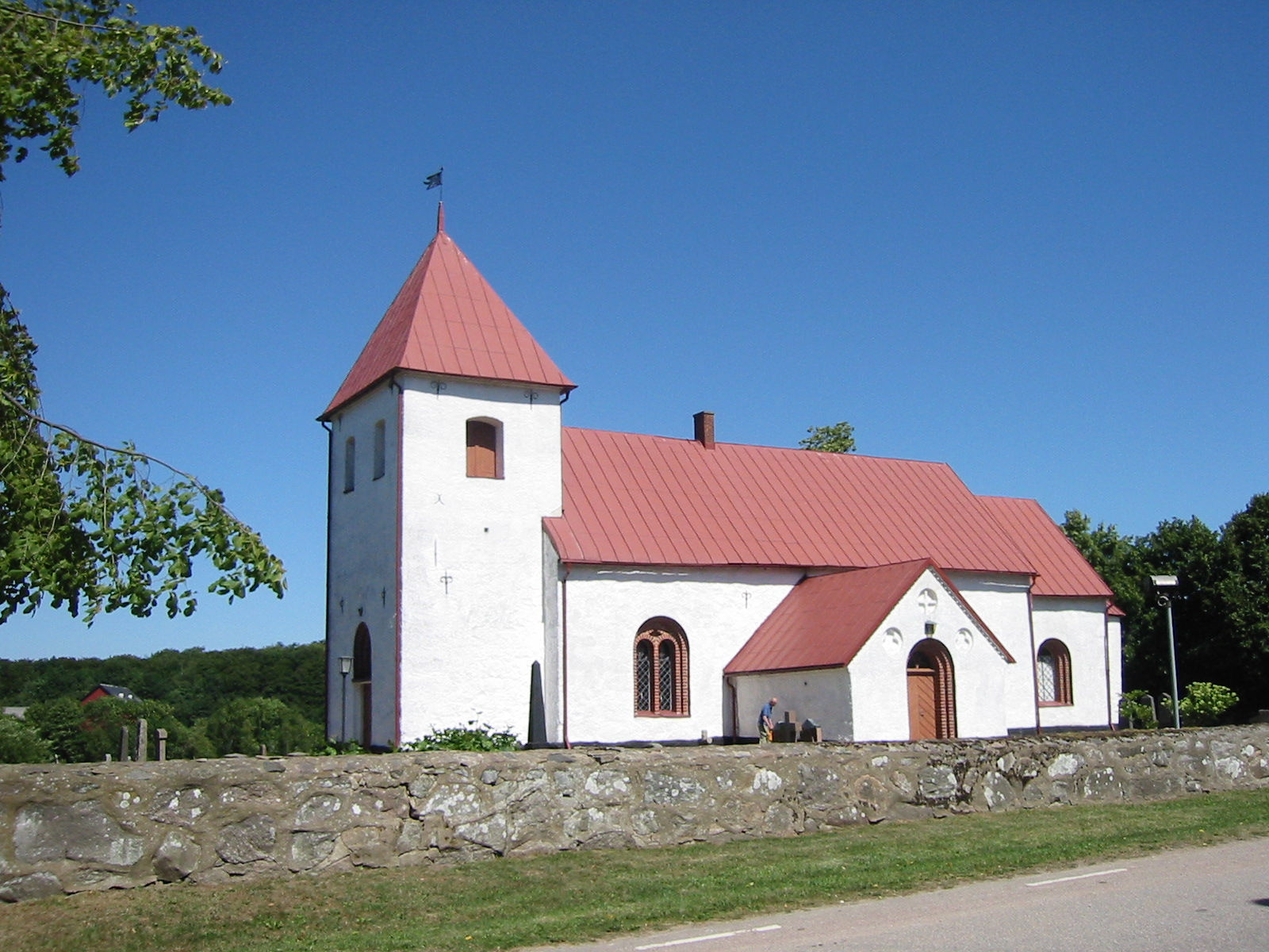 Konga kyrka.